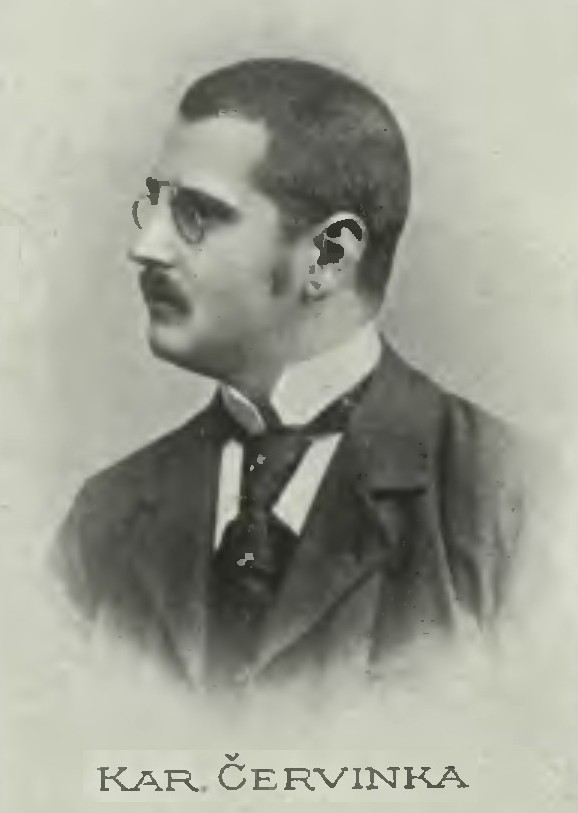 Portrét – Karel Červinka (1872 - 1949), Český básník a prozaik .